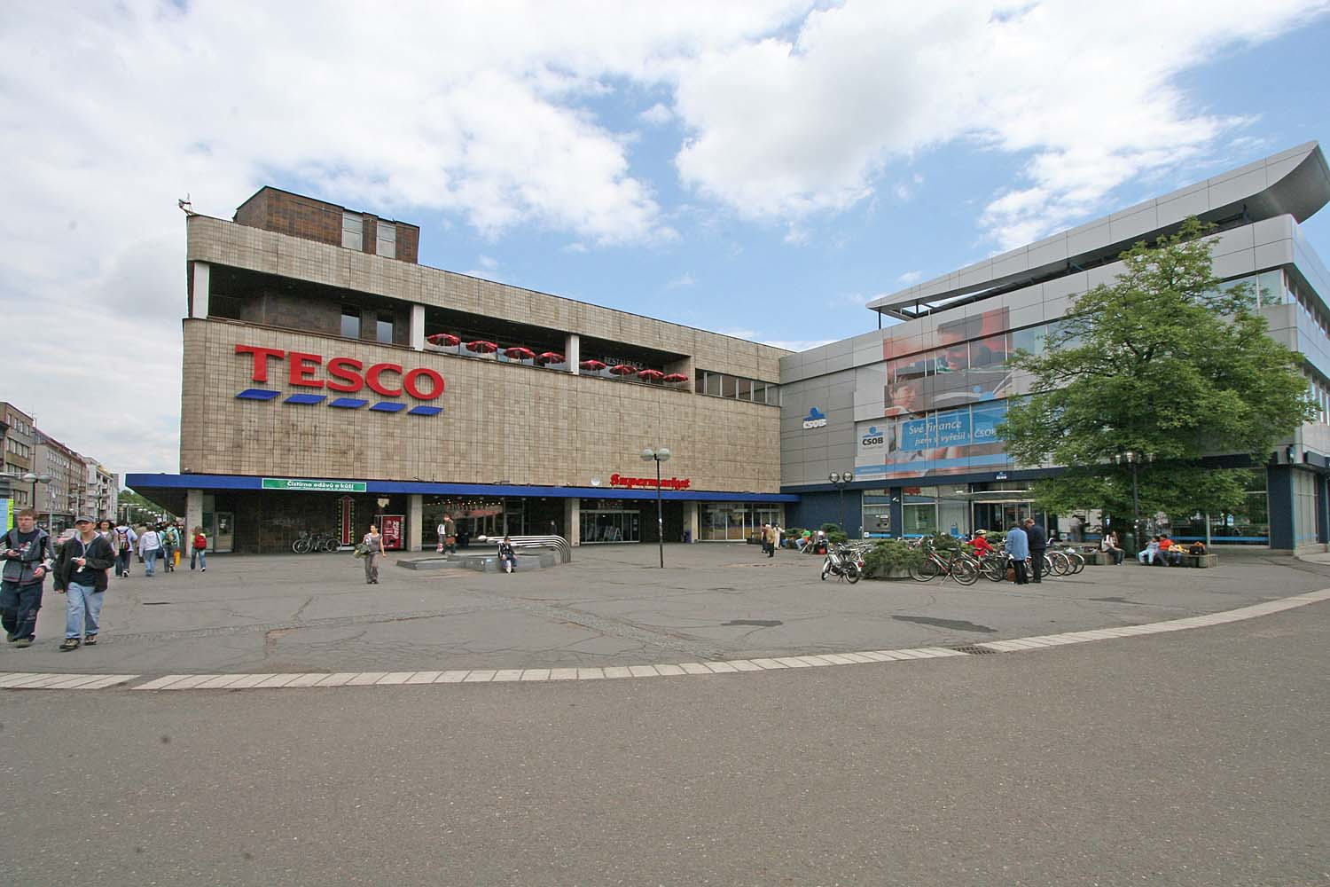 Hradec Králové - Tesco